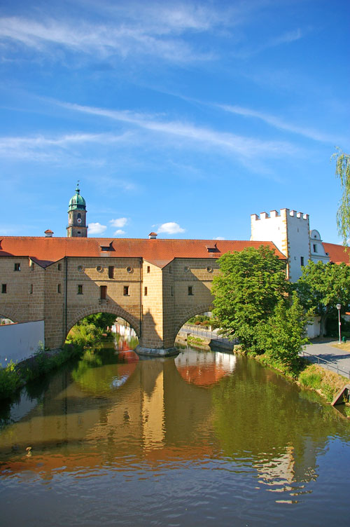 Die Stadtbrille, das Wahrzeichen von Amberg